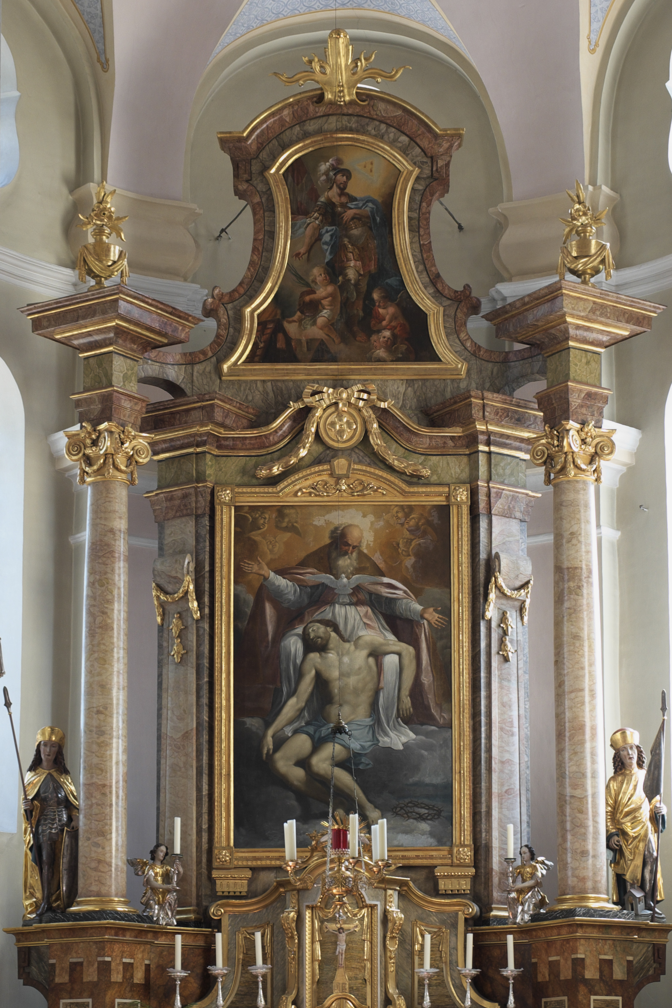 Katholische Pfarrkirche St. Florian in Fraunberg im Landkreis Erding (Bayern/Deutschland), Hauptaltar